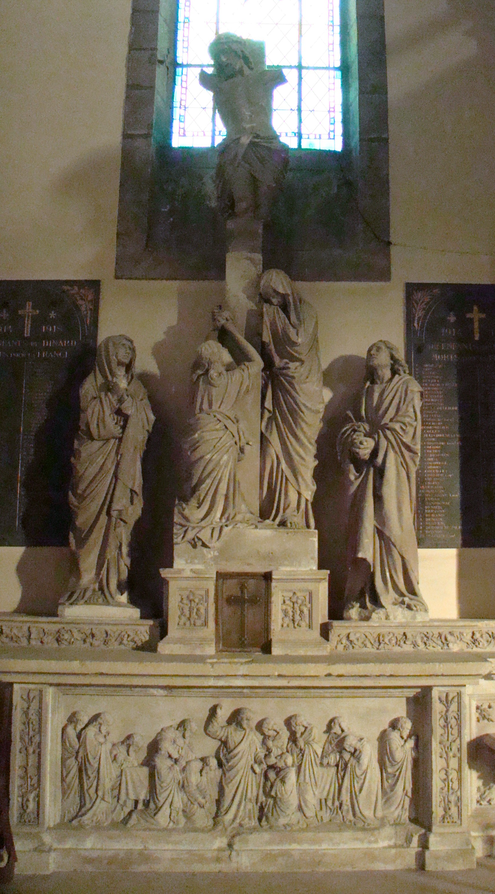 Ancien Maître Autel de l'église Notre-Dame de Dinard abîmé par les bombardements pendant la seconde guerre.